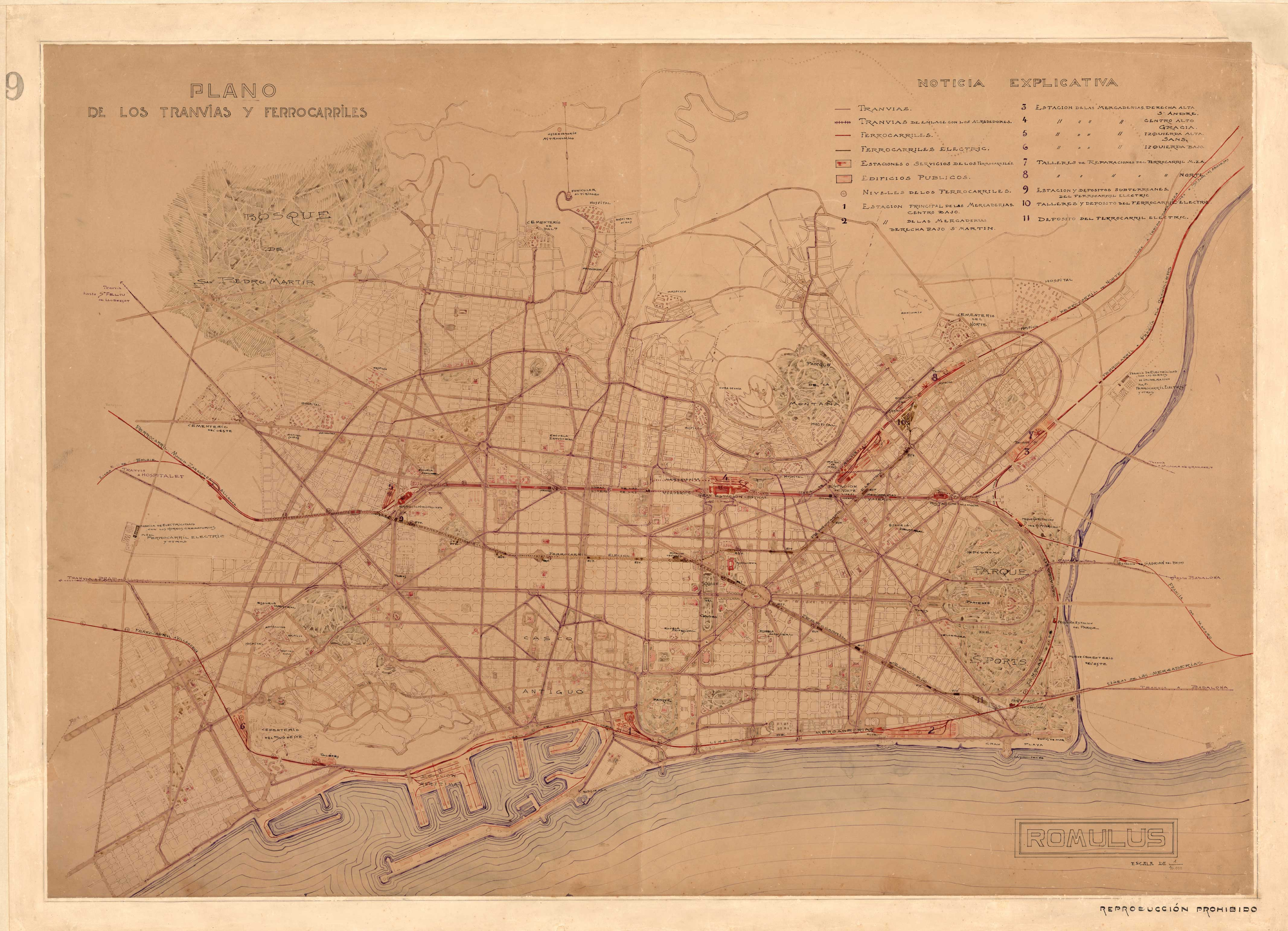 Plano de la ampliacion de avenidas y mejora de los tranvias